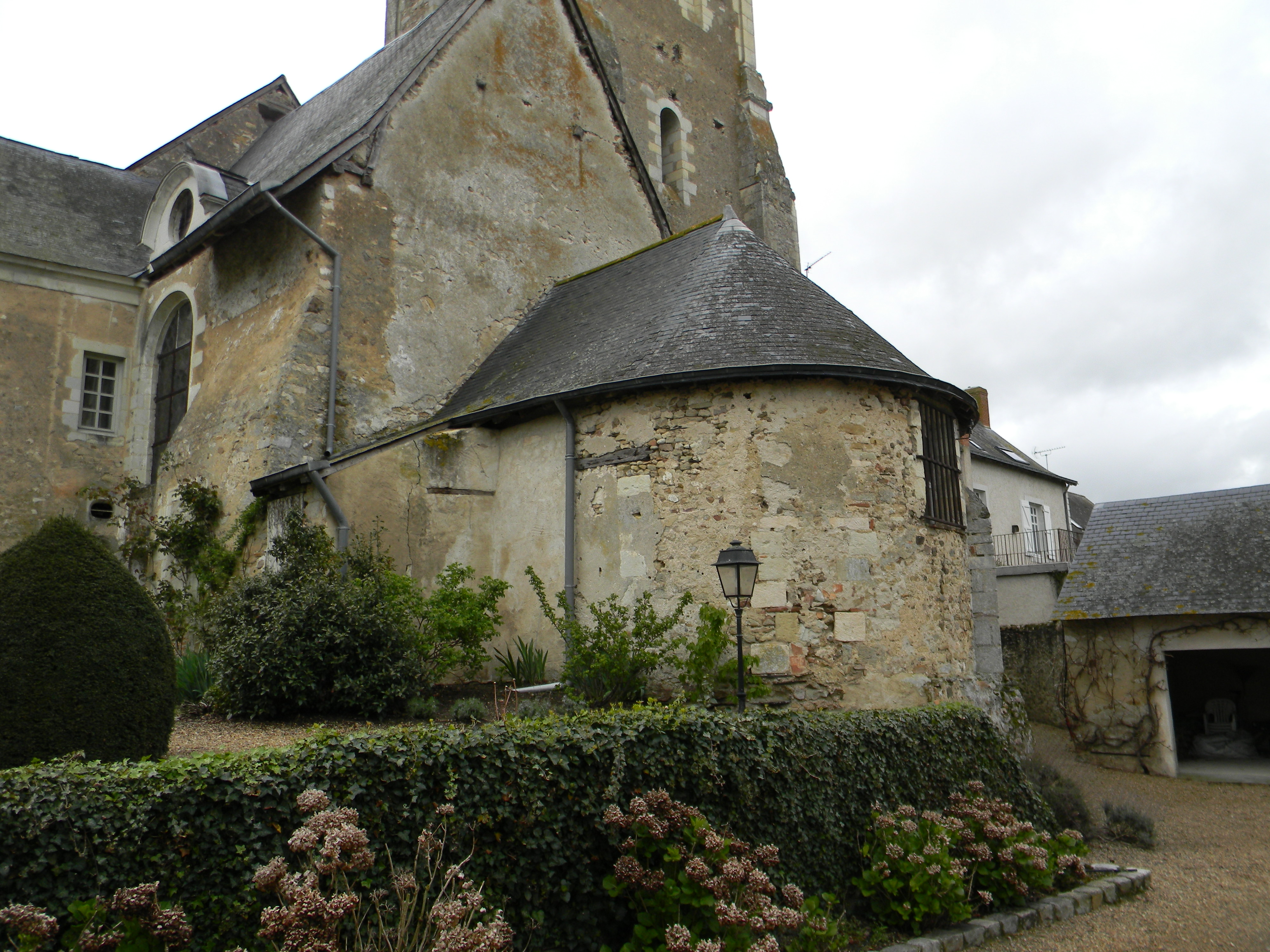 Sacristie de l'église Notre Dame de Brissarthe, dans l'abside. (vue extérieure)